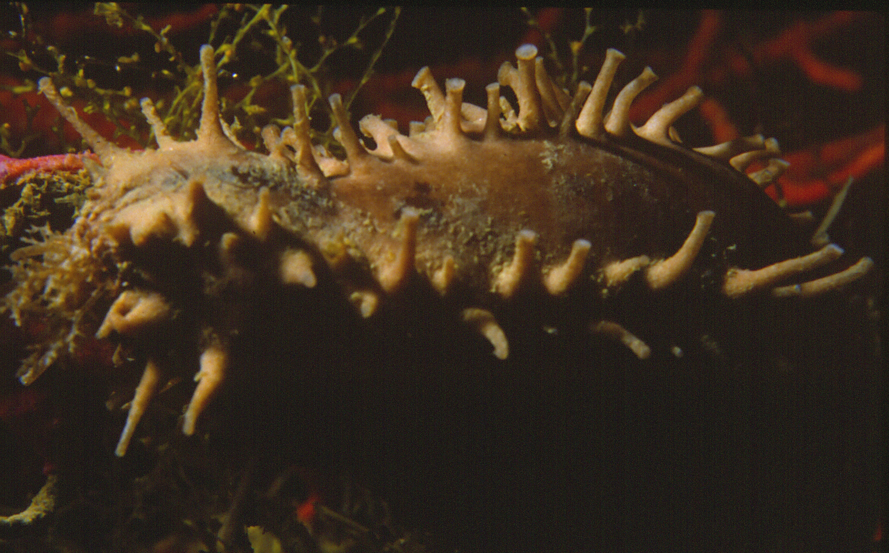 Ocnus planci (Brandt, 1835) - Banyuls-sur-Mer : 08/85